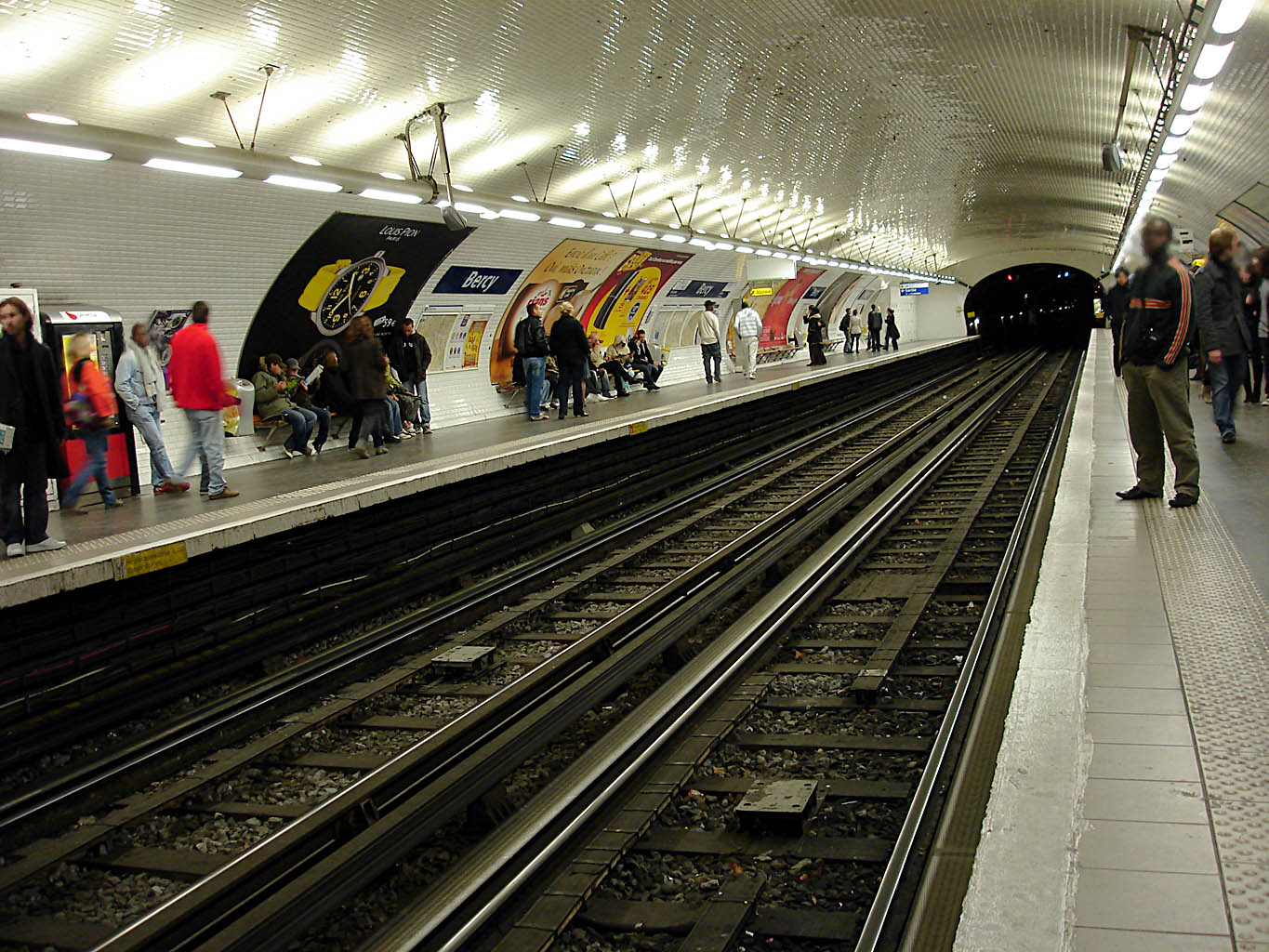 Station Bercy de la ligne 6 du métro de Paris, France.